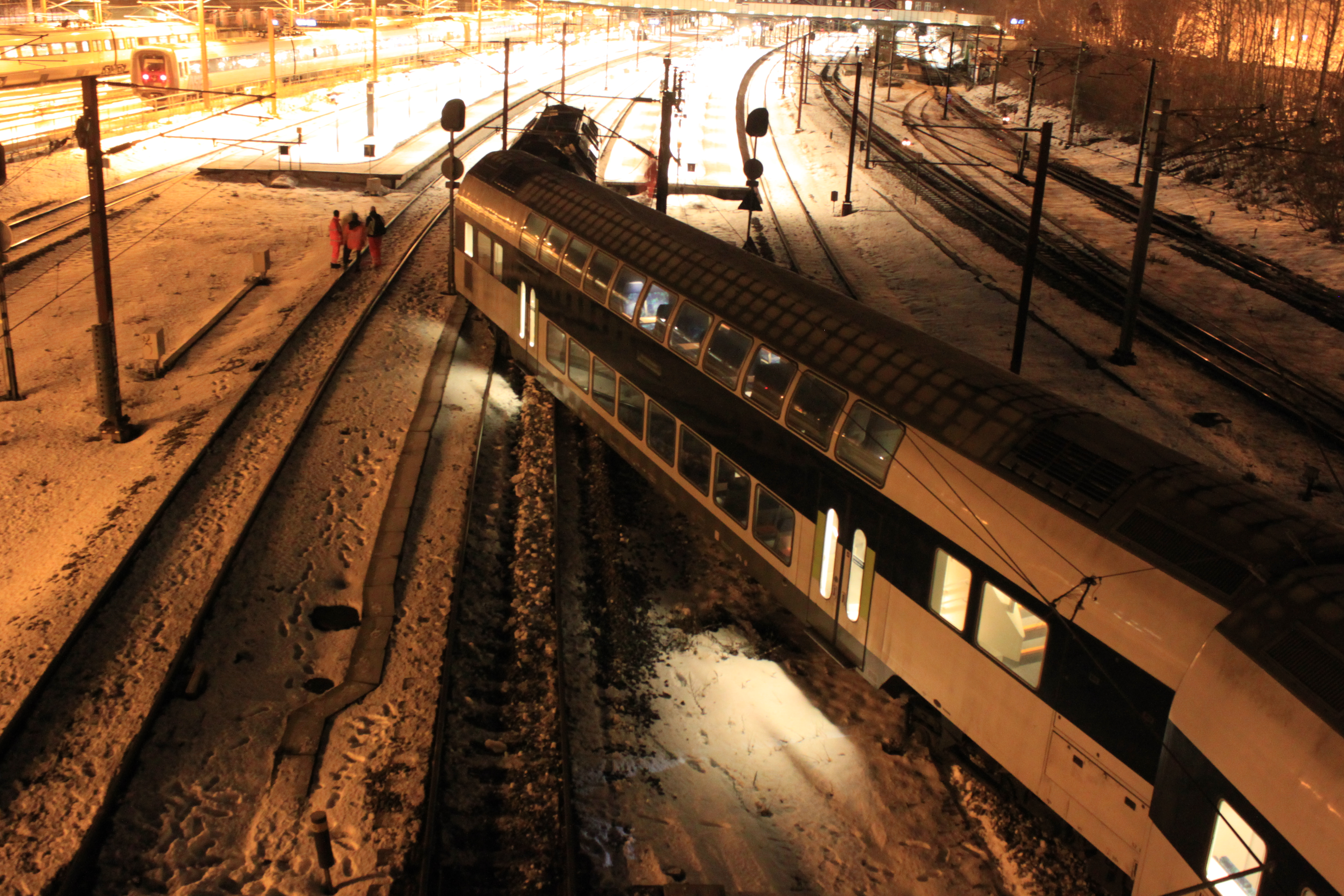 Afsporing af kystbanetog nord for Østerport station. Set fra Langeliniebroen mod syd.